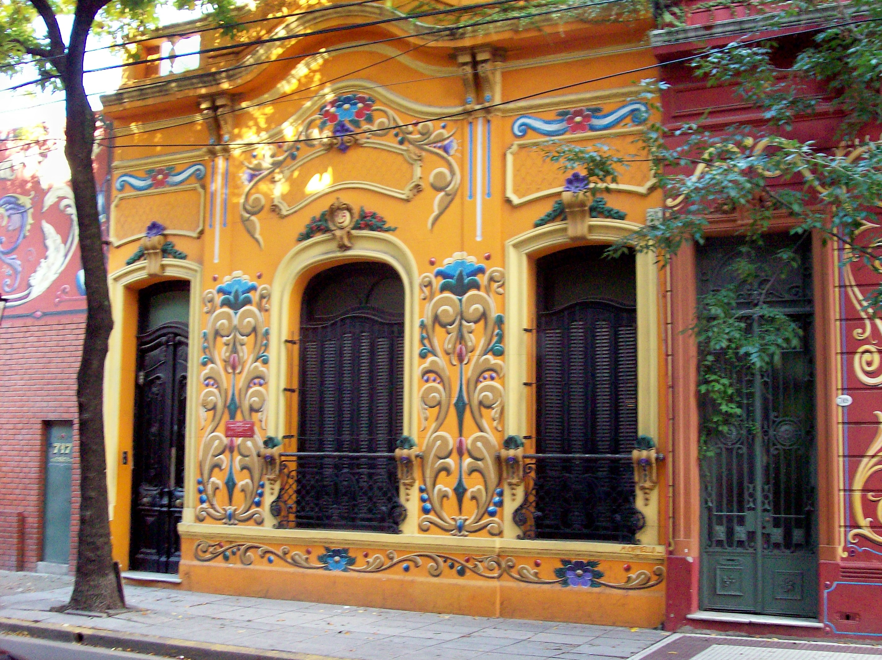 FILETEADO PORTEÑO: Buenos Aires, calle Jean Jaures 715 ("Paseo del Filete") frente pintado por Mariano Miguel Capiello